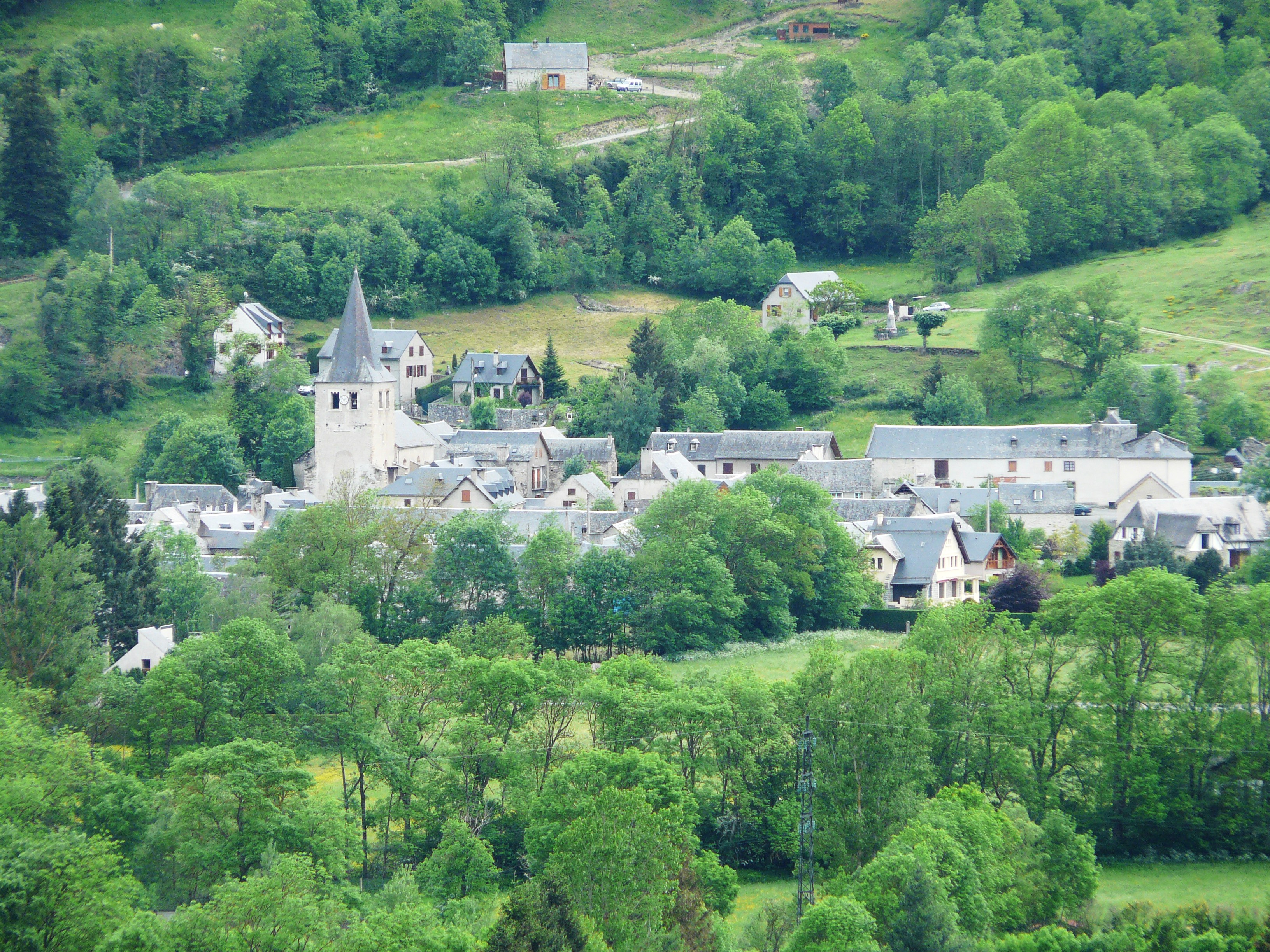 Le village de Bourisp, Hautes-Pyrénées, France.